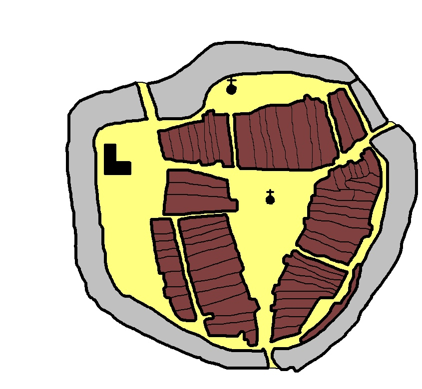 Městské opevnění (Vyškov- czech republic)